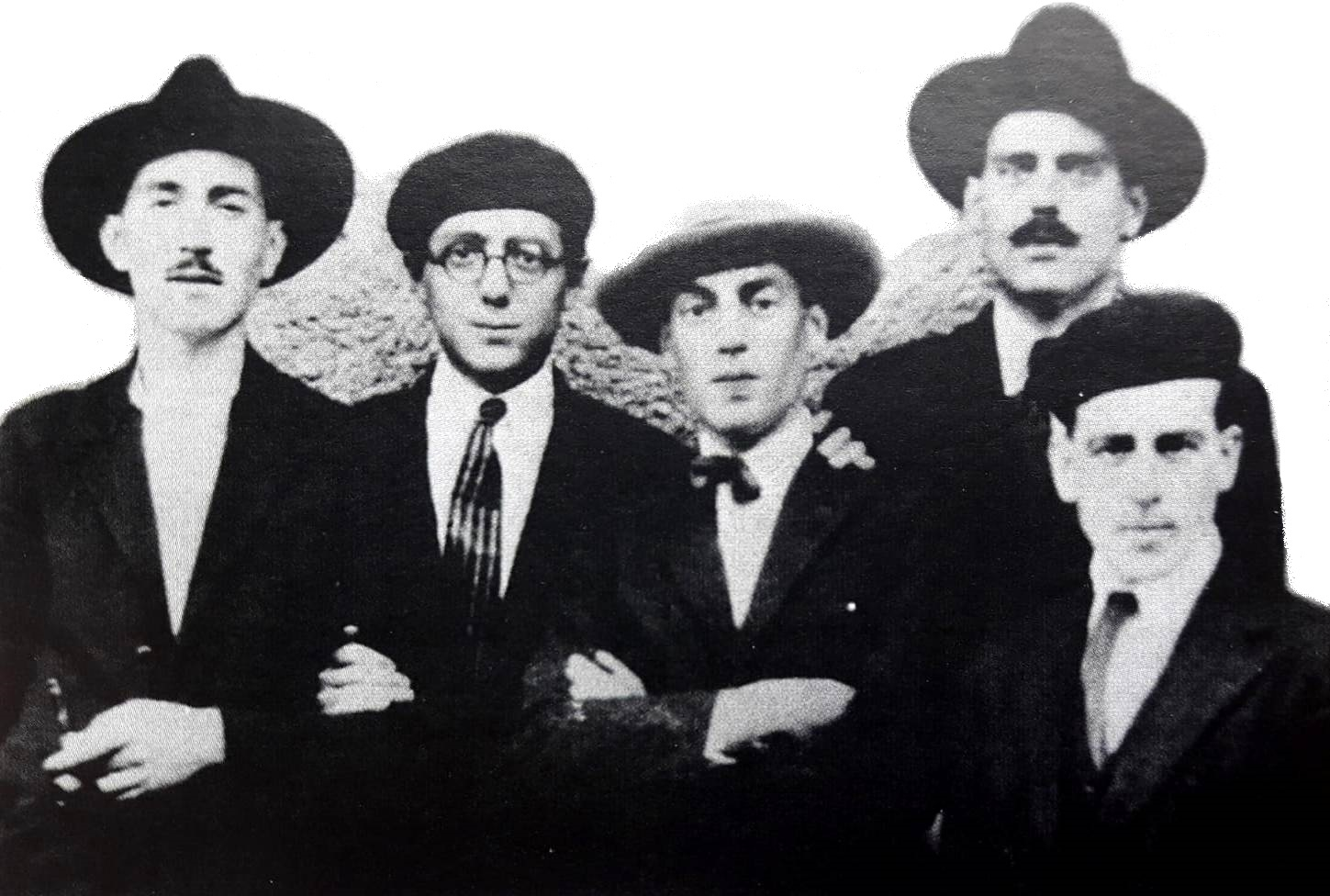 Manuel Antonio, Manuel R. Castelao, Rafael Dieste, Xosé Losada Castelao e Laureano Lorenzo